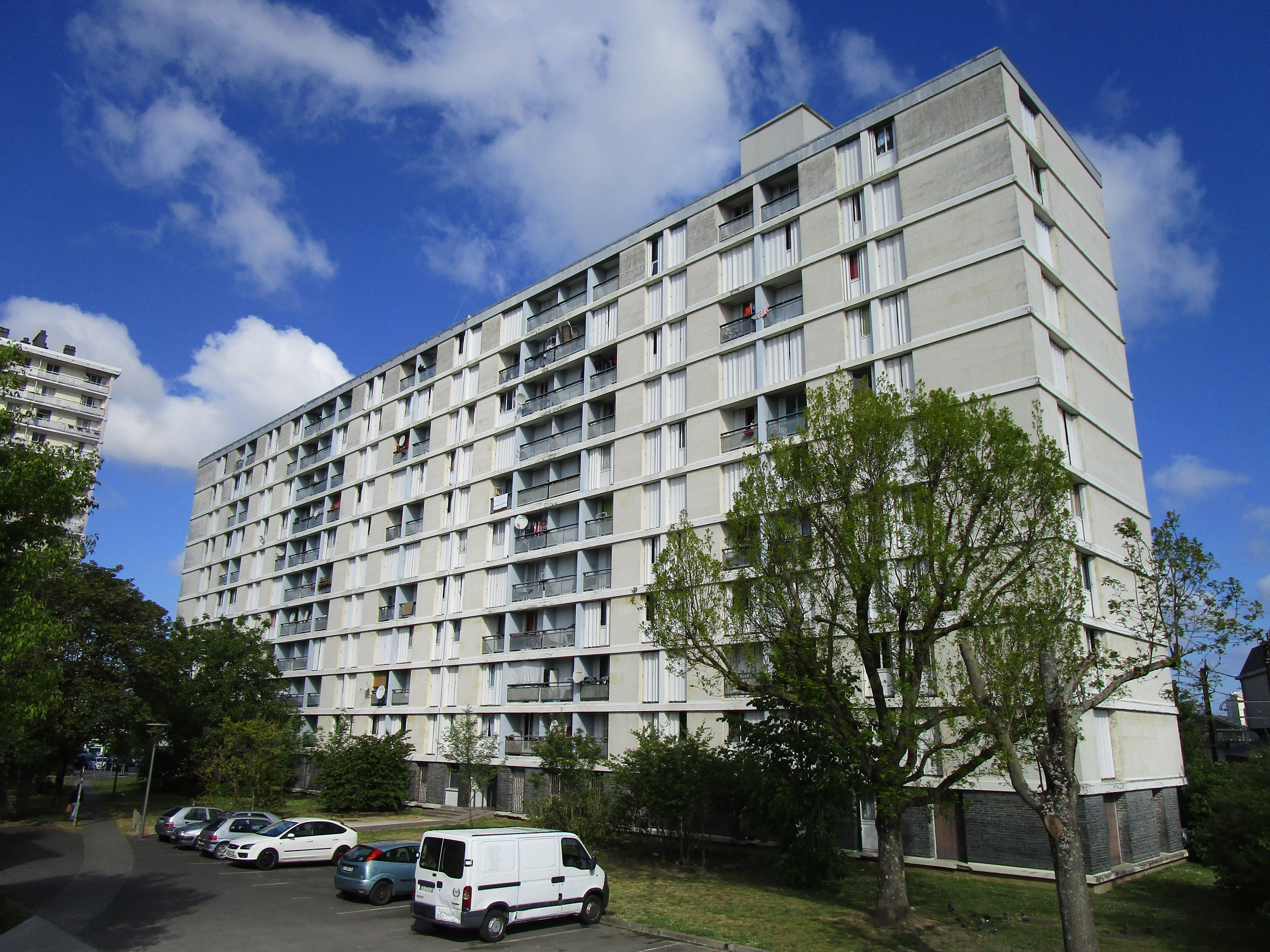 Vue de l'un des bâtiments du lot de 811 du quartier Sanitas, sur l'allée de la Bechellerie.